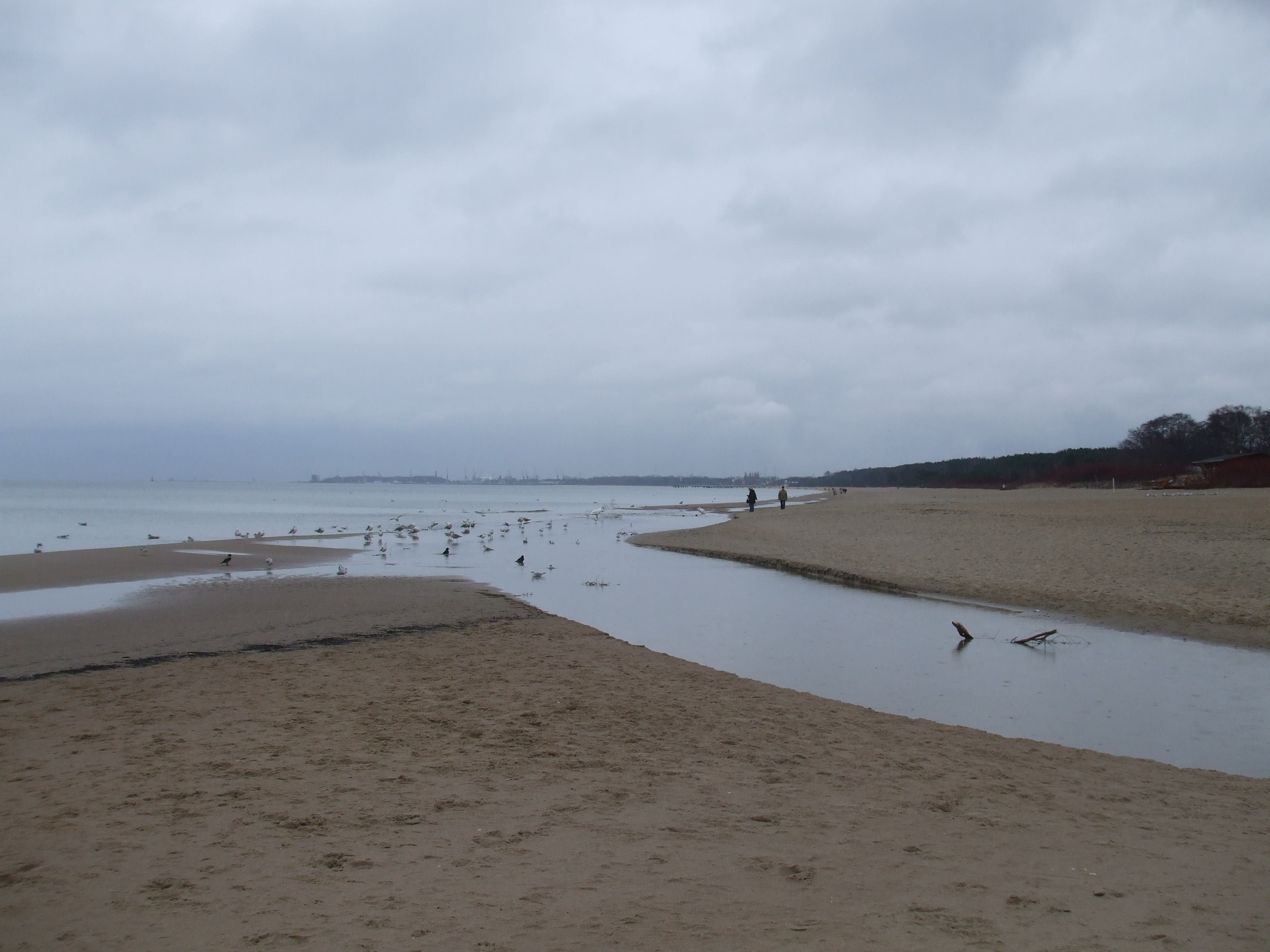 Potok Oliwski, ujście do Zatoki Gdańskiej Gdańsk, Poland